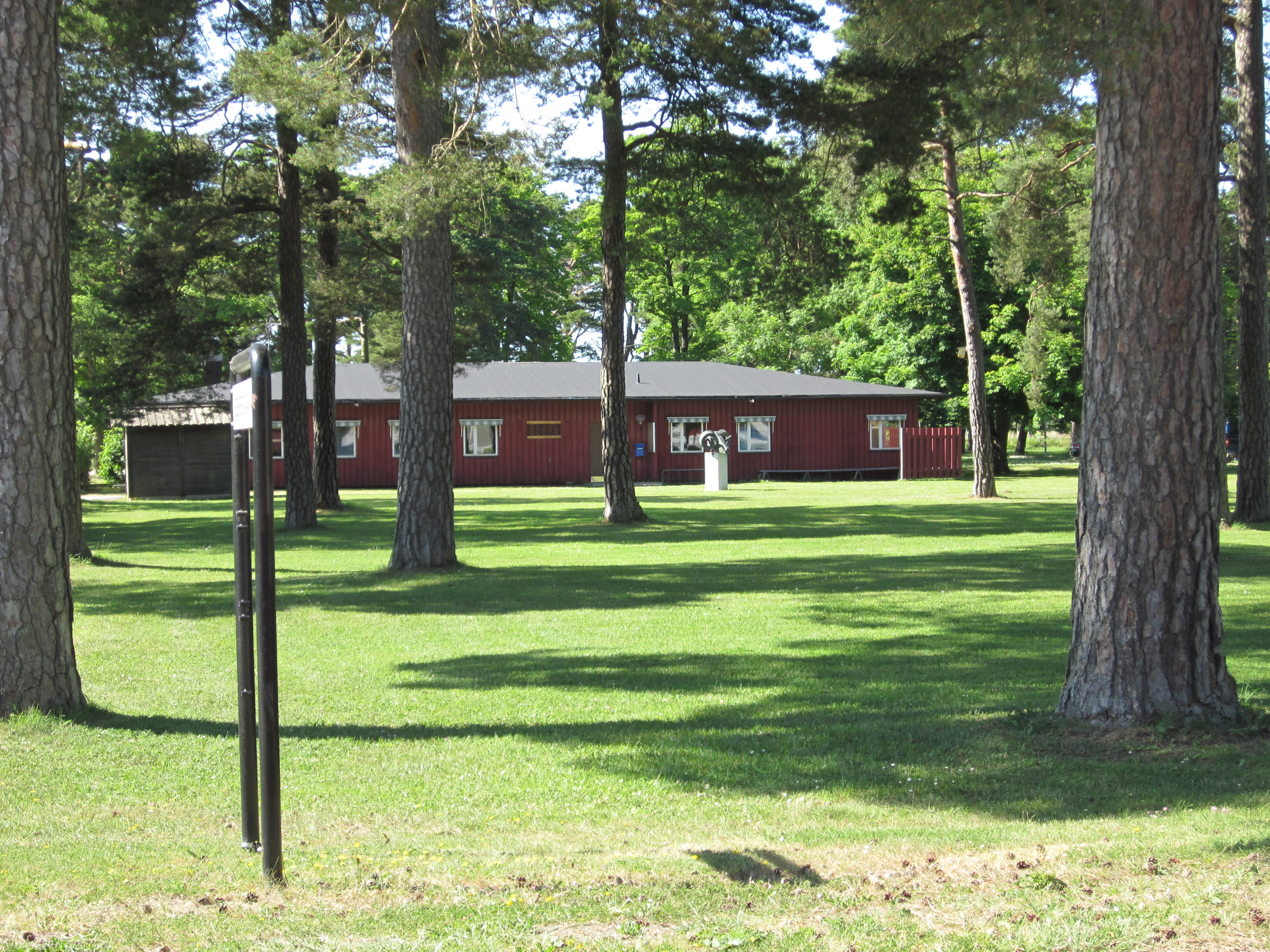 Hemvärns- och frivilligavdelningen på Gotlands regemente, P 18. Uppförd 1973.